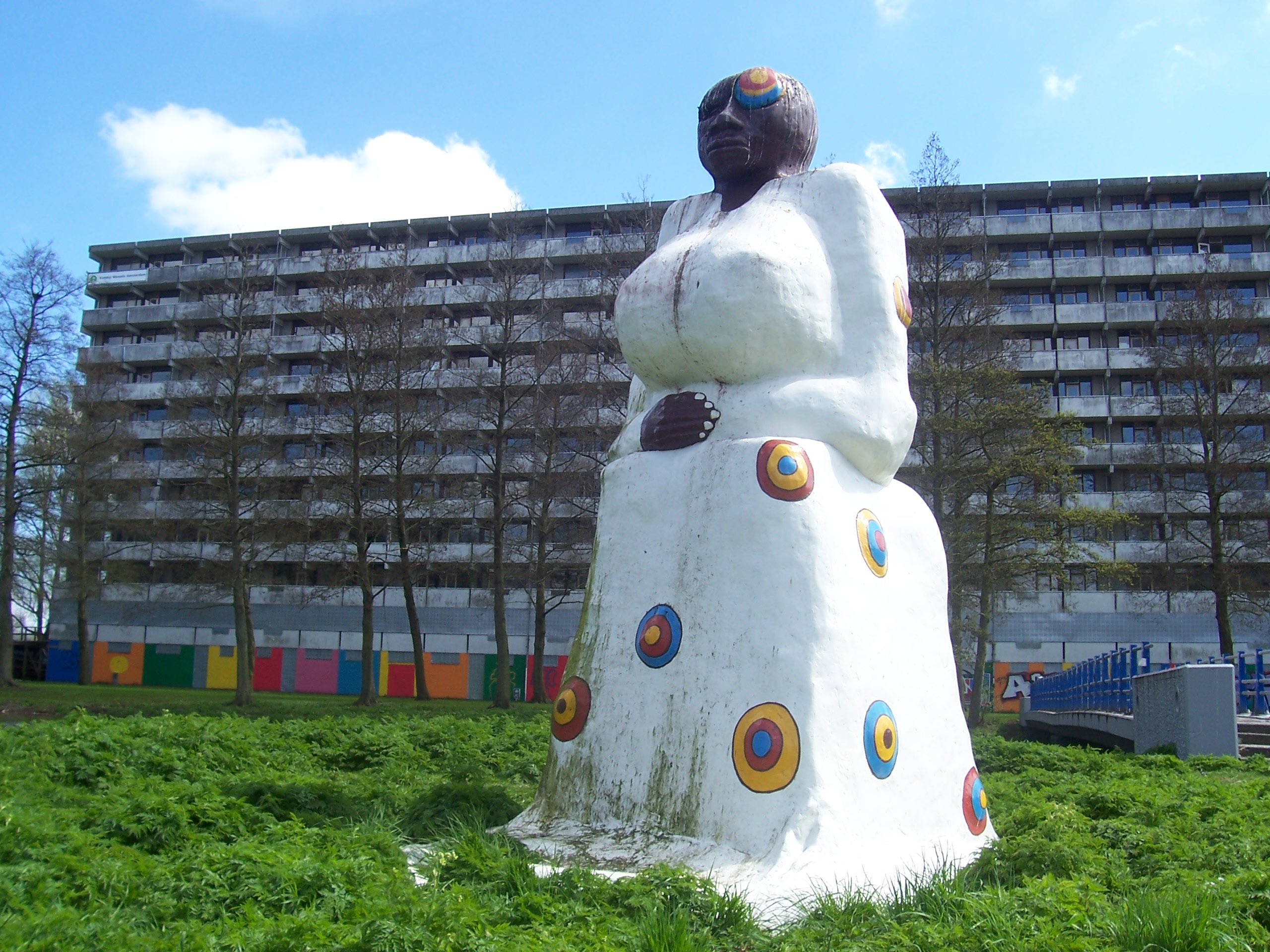 Ma Aisa, door Chaim Oren. Ook centraal beeld (met fictieve naam) in het boek Vluchtwegen van Michiel van Kempen